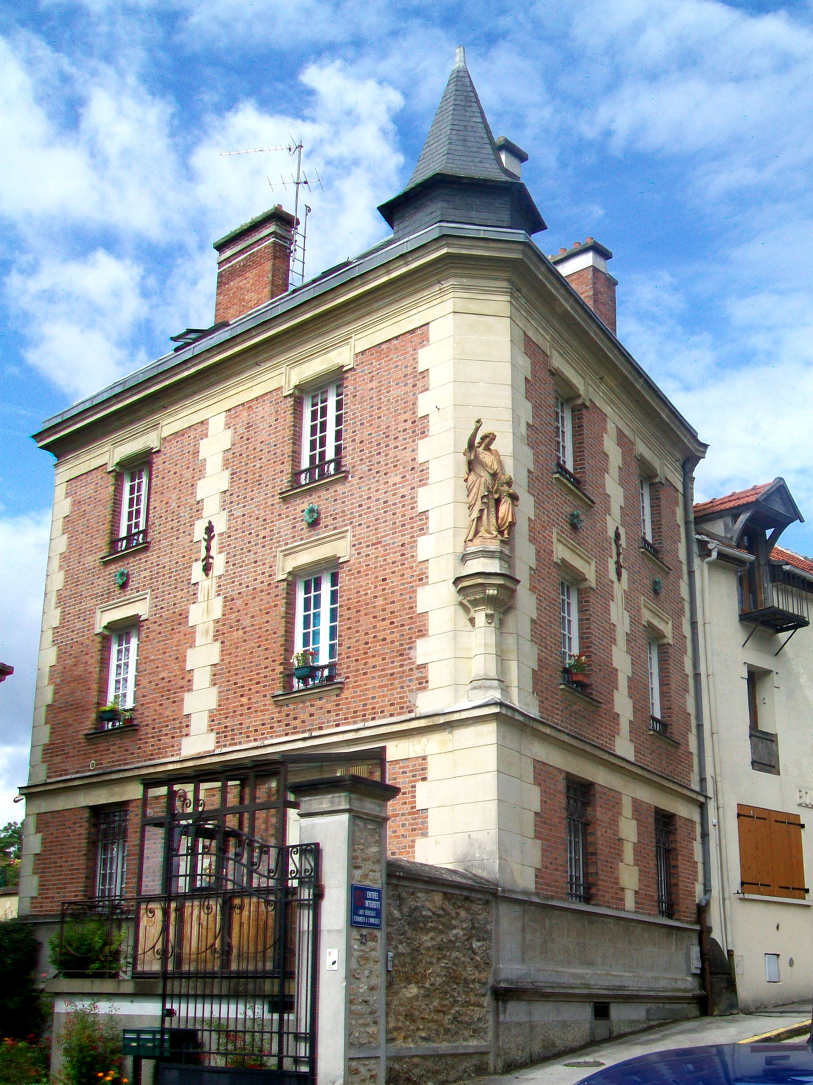 La maison dite de l'Ange-gardien, au 23 rue de la Mairie.